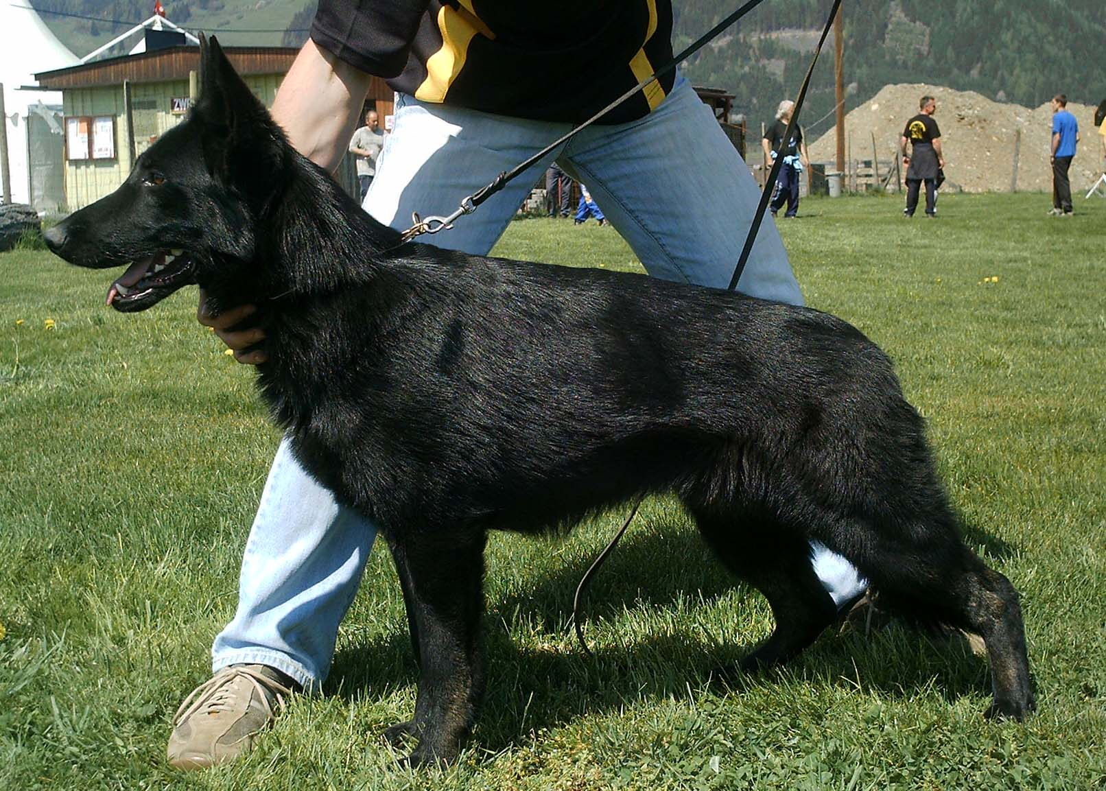 Deutscher Schäferhund "Jessy vom Gernkogel"